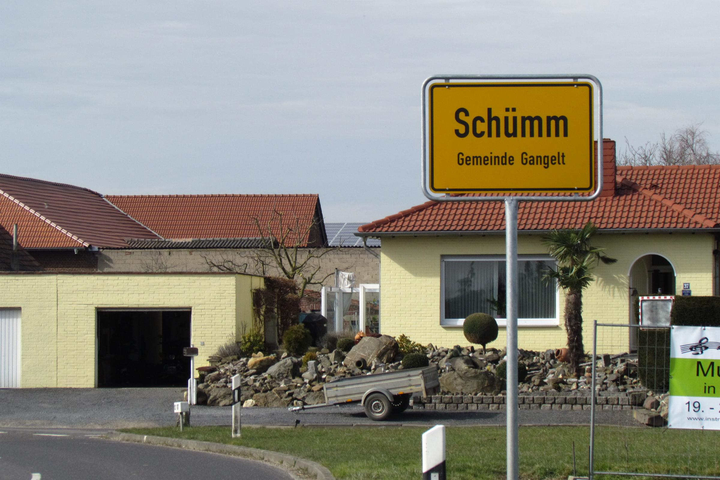 Ortseingang Schümm